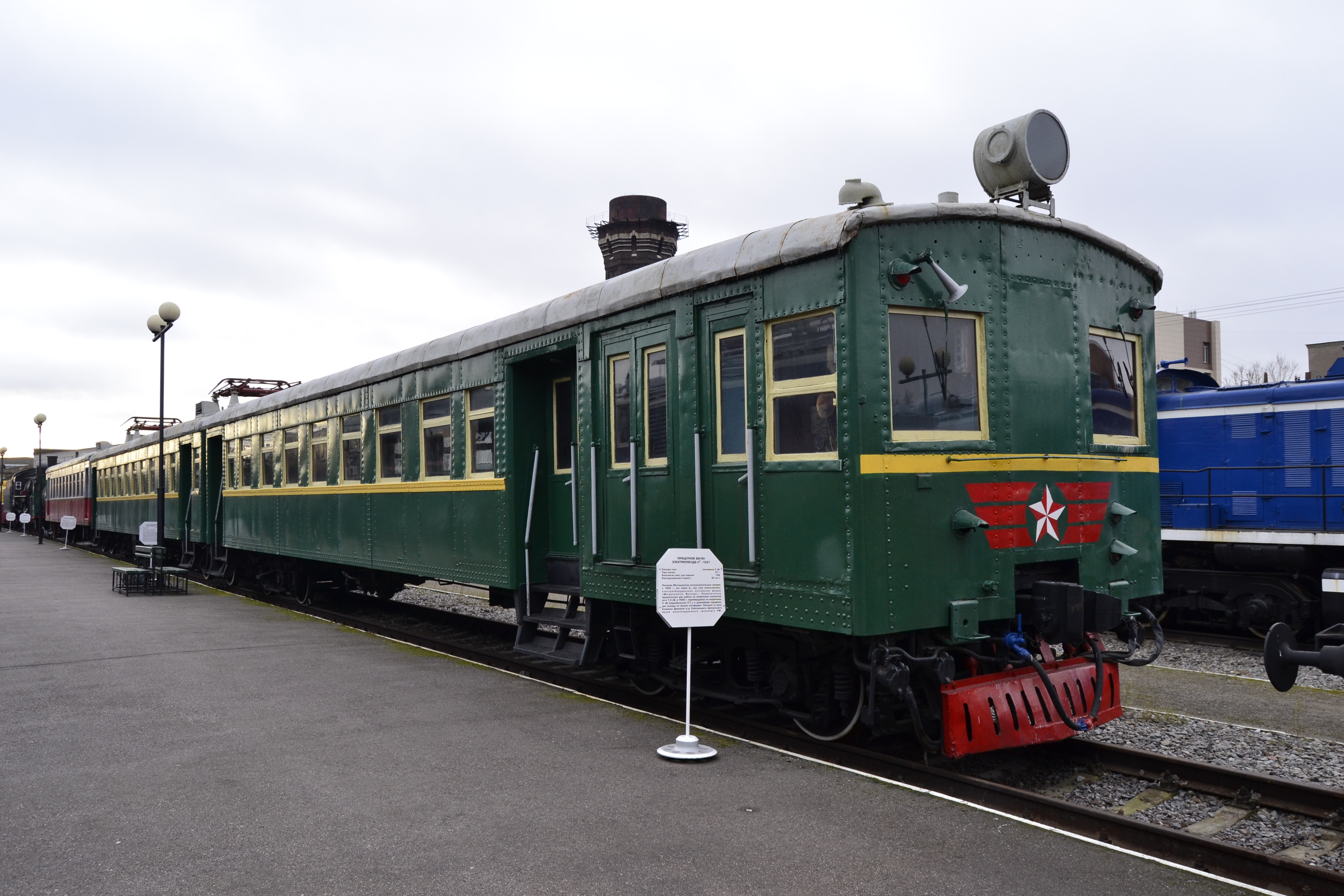 Музей ж/д транспорта